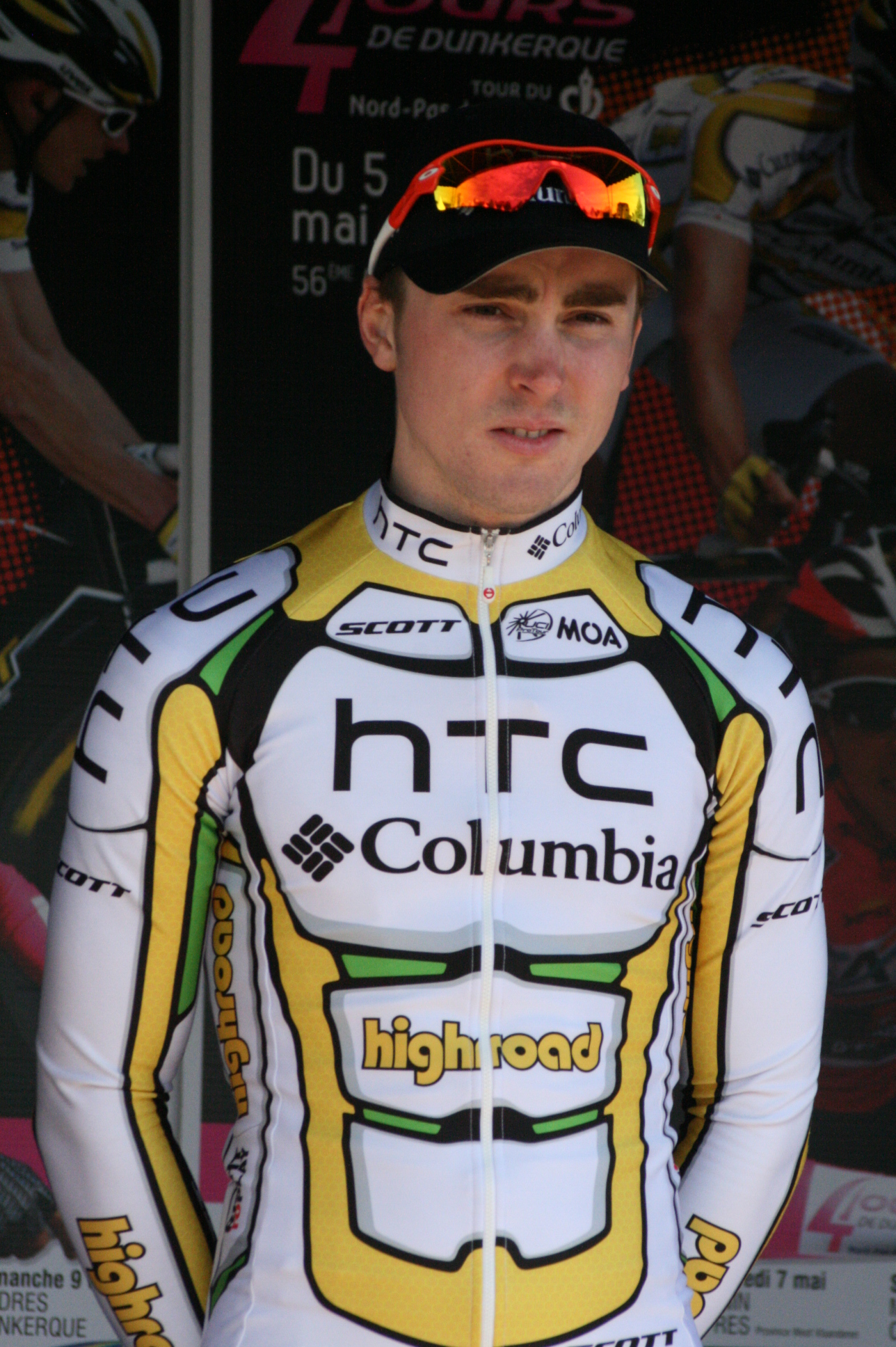 Leigh Howard lors de la présentation des équipes des 4 jours de Dunkerque 2010